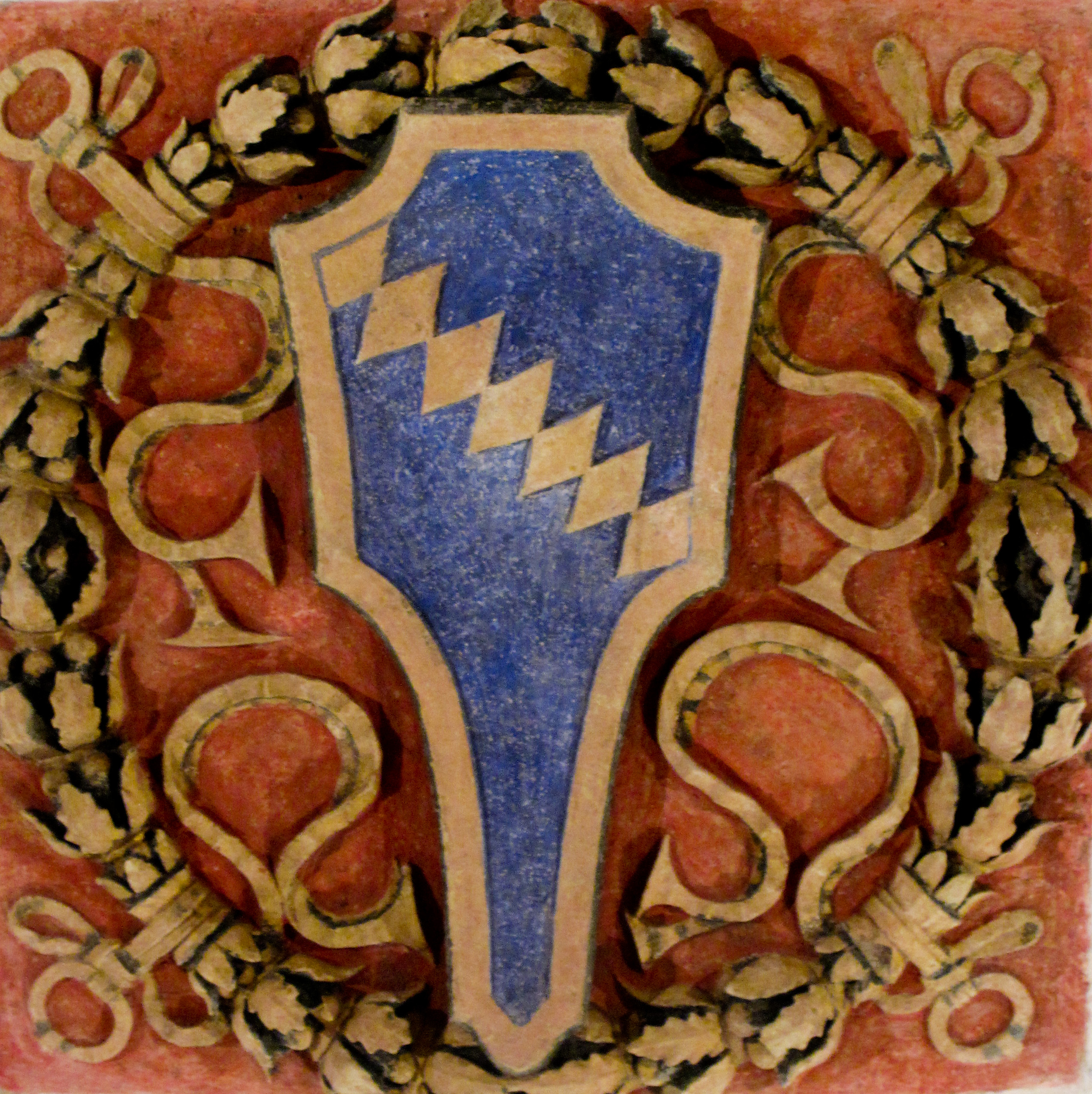 Vicenza - Chiesa di Santa Corona - Stemma della famigliaValmarana nella cripta